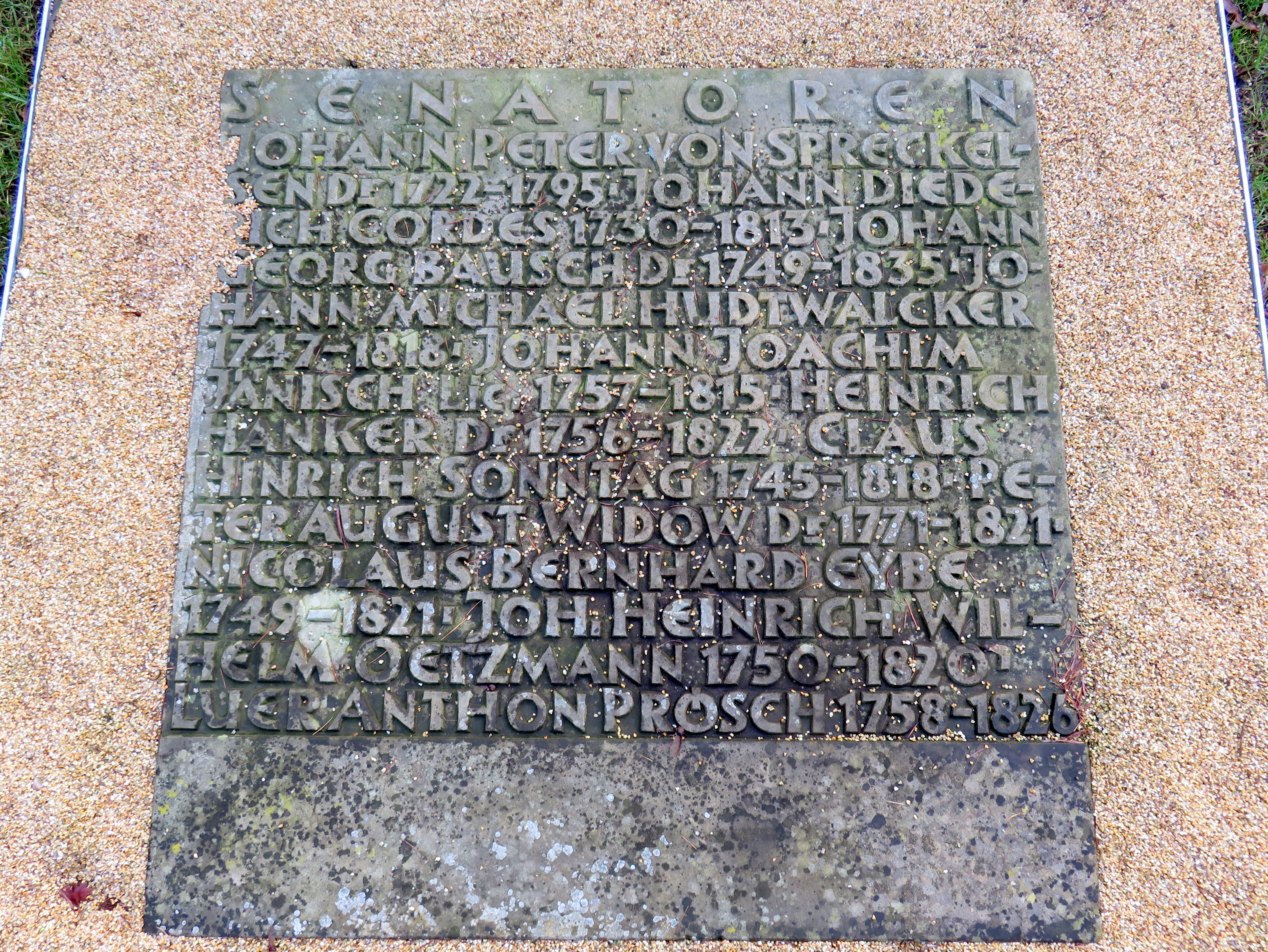 Sammelgrabmal Senatoren (I) im Bereich des Althamburgischen Gedächtnisfriedhofs auf dem Hamburger Friedhof Ohlsdorf zu Ehren von unter anderen Johann Peter von Spreckelsen, Johann Diederich Cordes, Johann Michael Hudtwalcker.